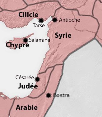 carte des provinces romaines au moyen orient vers le début de l'ére chrétienne